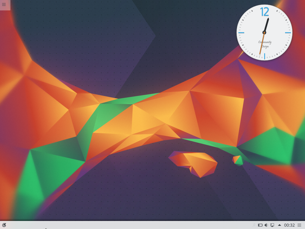 Desktop von Kubuntu 16.04